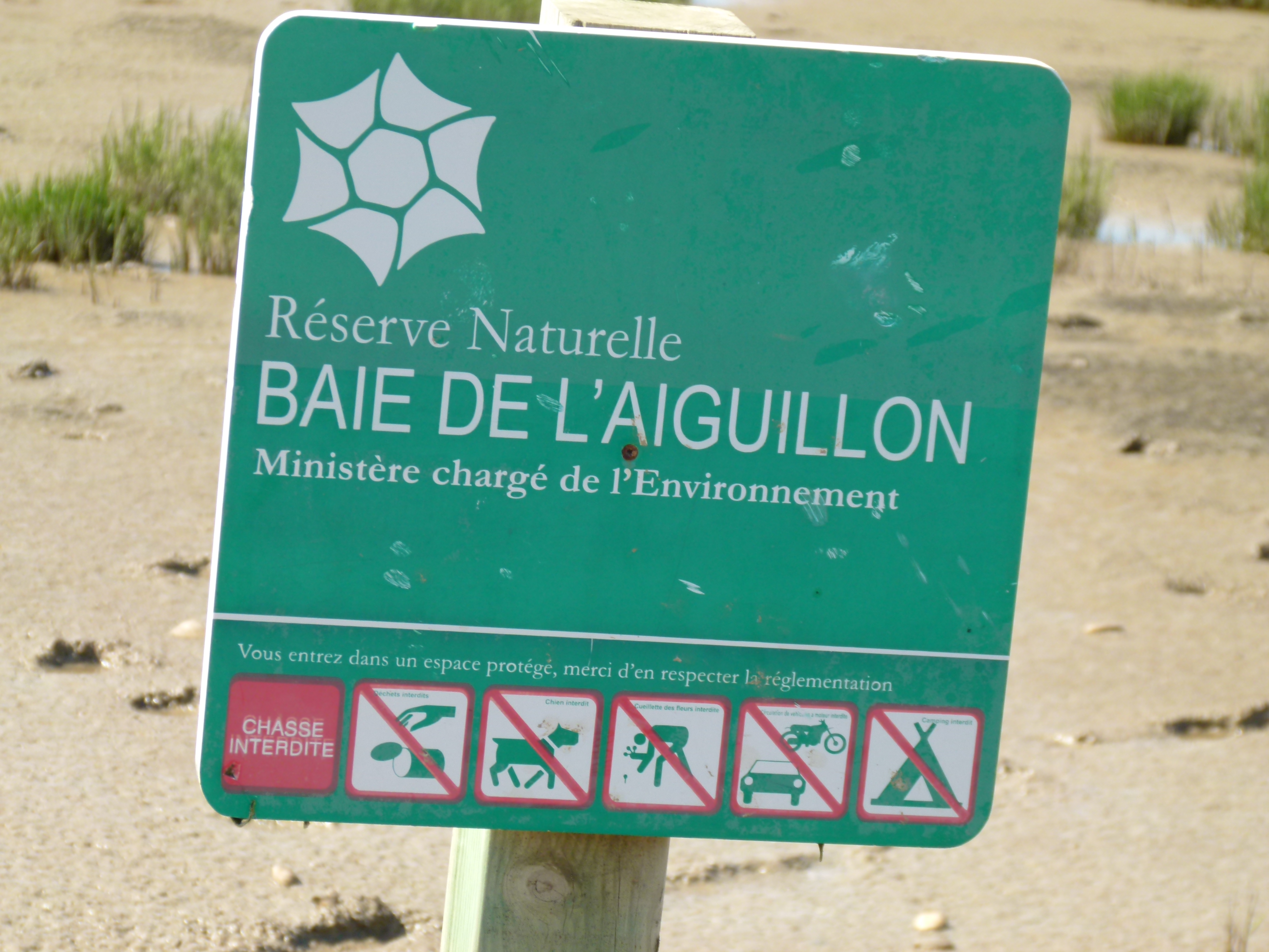 Pancarte signalant la baie de l'Aiguillon, située à la pointe Saint-Clément à Esnandes (17)